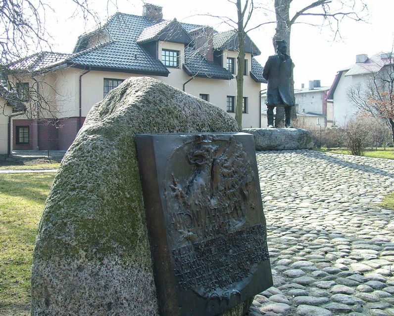 Puck - pomnik Antoniego Abrahama.